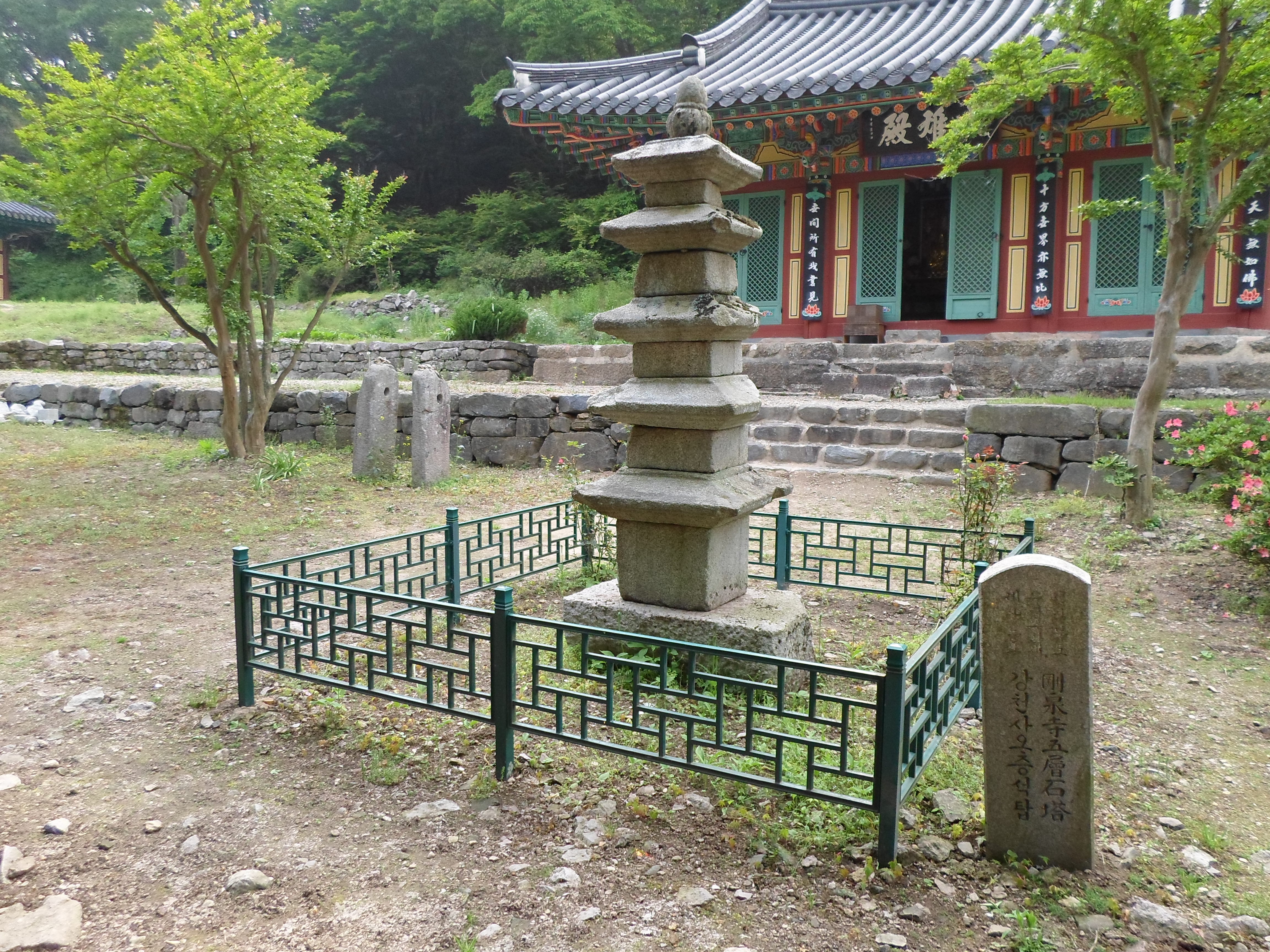 전라북도의 유형문화재 제92호 강천사 오층석탑.